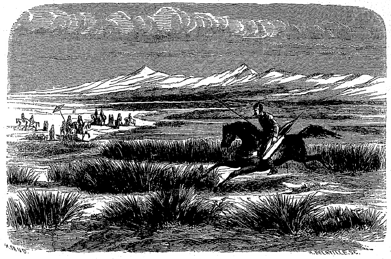 Illustrations de Maurice Sand pour "Kourroglou" de George Sand, dans sa réédition incluse dans les "Œuvres illustrées de George Sand" parues à Paris chez Hetzel, volume 5, 1853 ("Kourroglou" est l'avant-dernier texte du volume 5). Illustration figurant en page 1. (Attention : dans les volumes des "Œuvres illustrées de George Sand", la pagination recommence à 1 au début de chaque texte inclus dans un volume.)